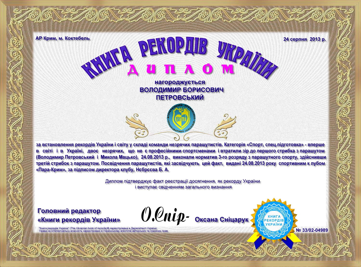 24 серпня 2013 року, в День Незалежності України, поблизу міста Коктебель (АР Крим, Україна) Володимир Петровський у складі команди незрячих парашутистів здійснив свій третій стрибок з парашутом на морську воду, без інструктора, не в тандемі, вперше в світовій історії отримавши третій розряд з парашутного спорту після втрати зору. Цей факт був зафіксований Книгою рекордів України 24 серпня 2013 року